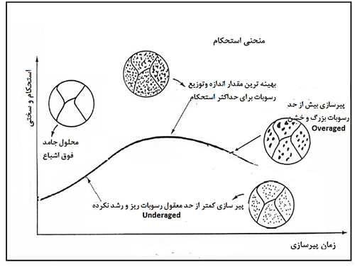 اثر زمان پیرسازی بر استحکام در استحکام بخشی به روش پیر سختی